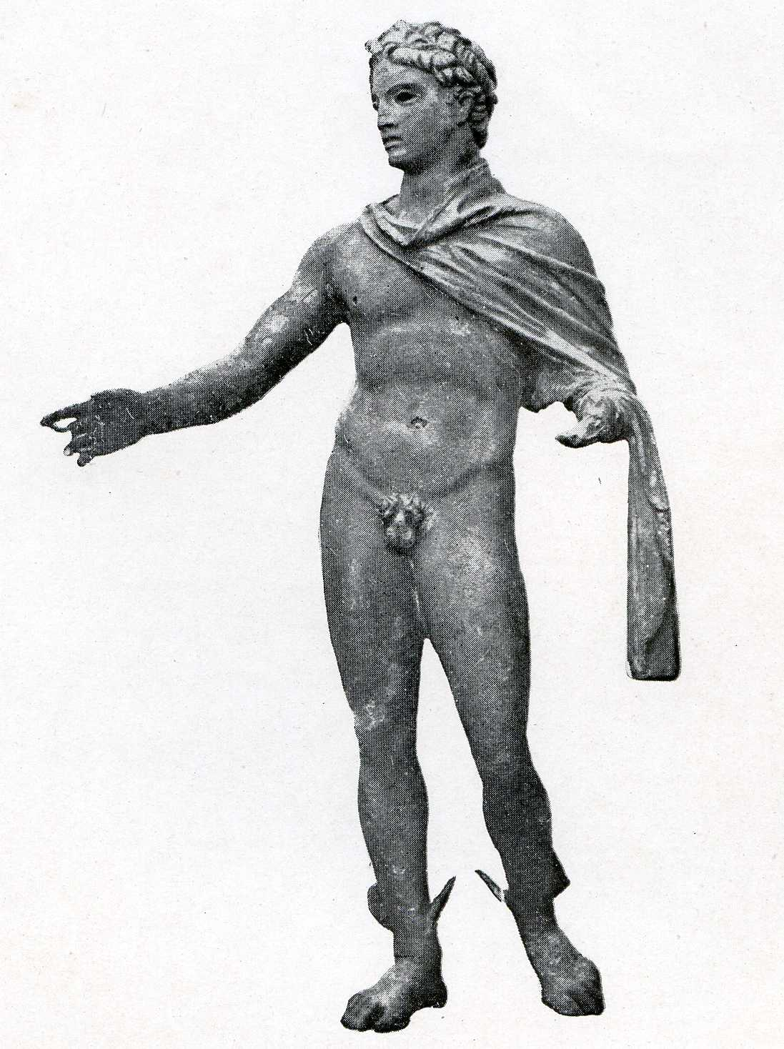 Hermès orateur, une des pièces découvertes sur l'épave de Mahdia